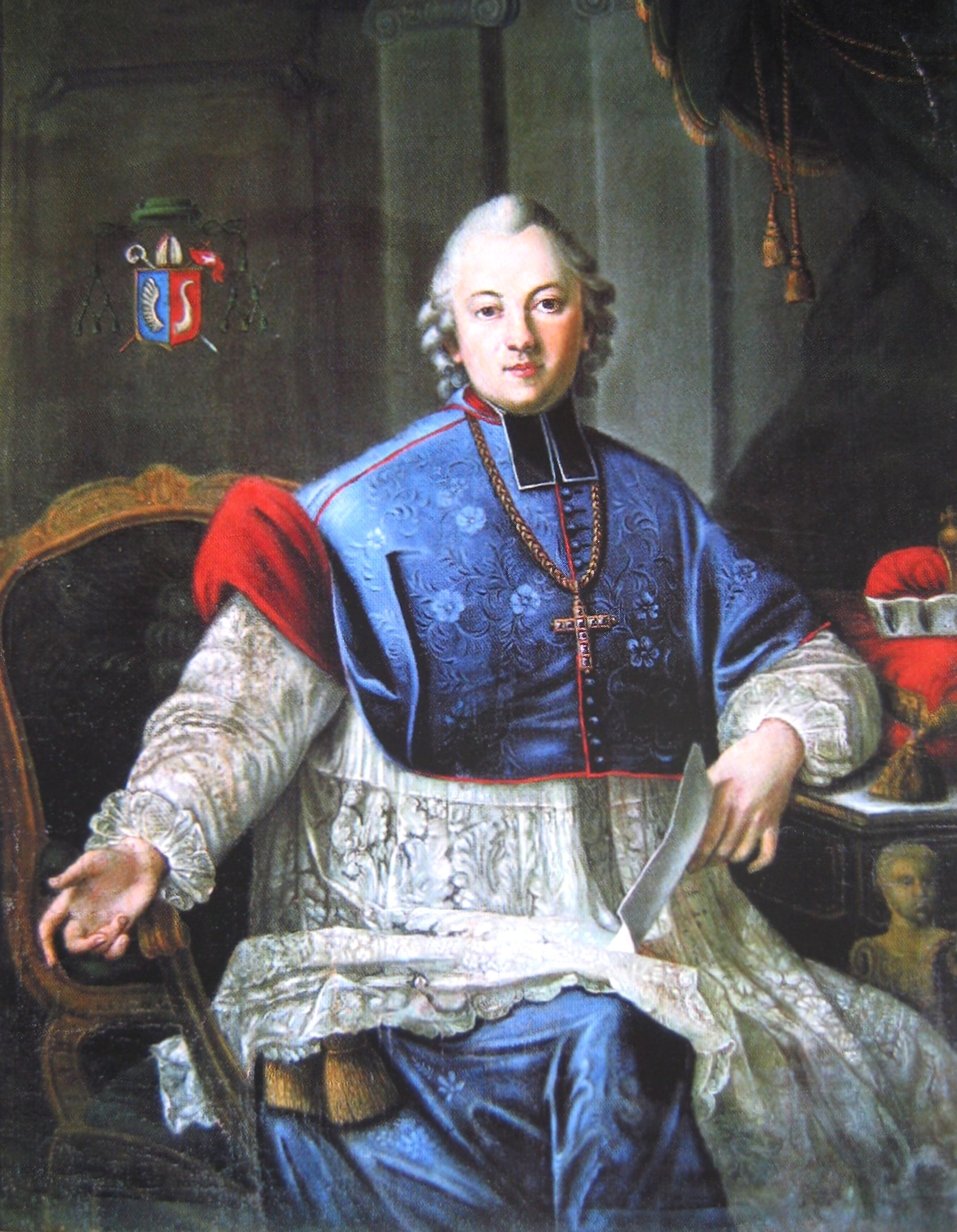 Portrait of Ignacy Krasicki (1735-1801)